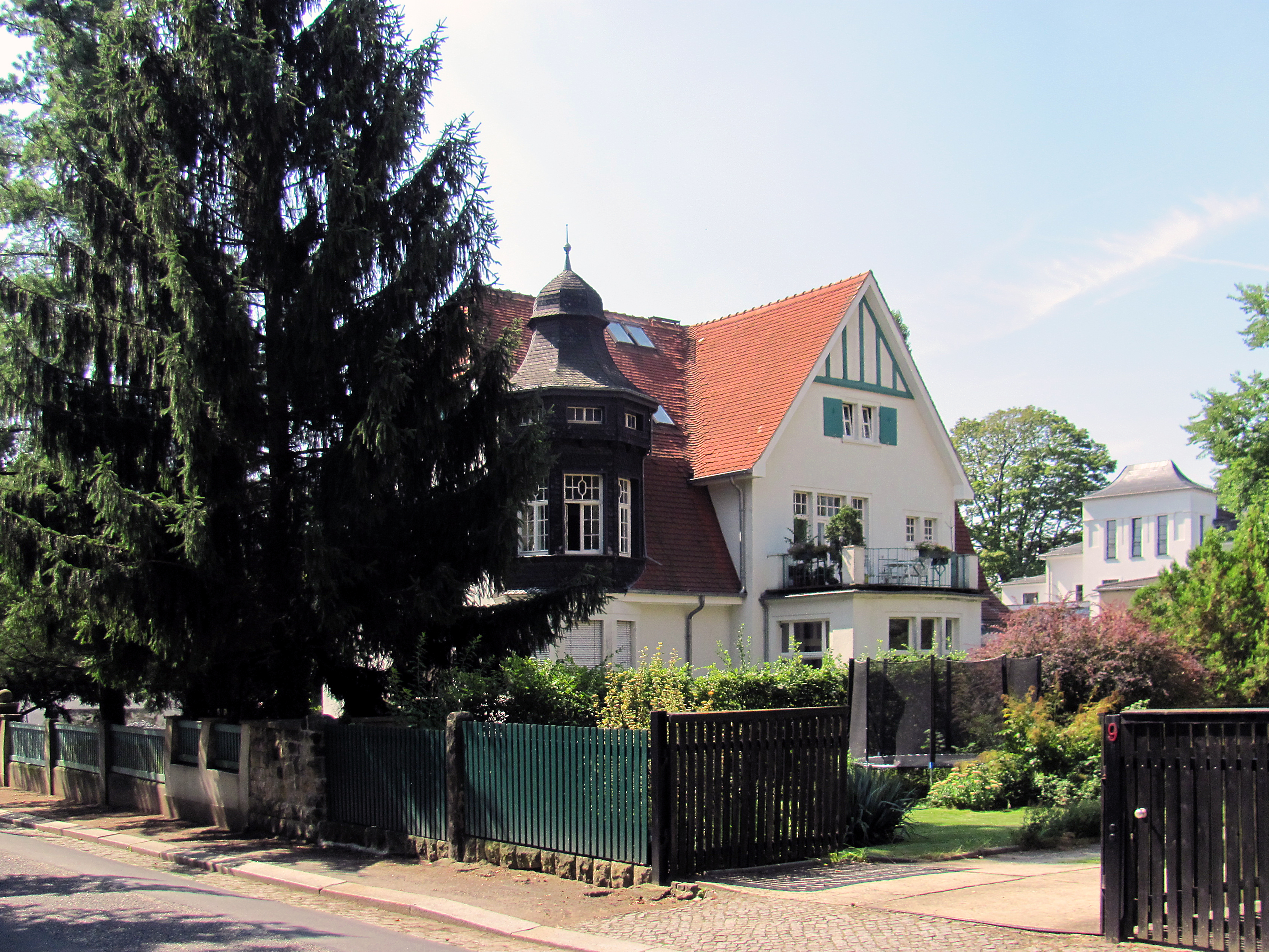 Radebeul-Serkowitz, Villa Paul Tzschöckel